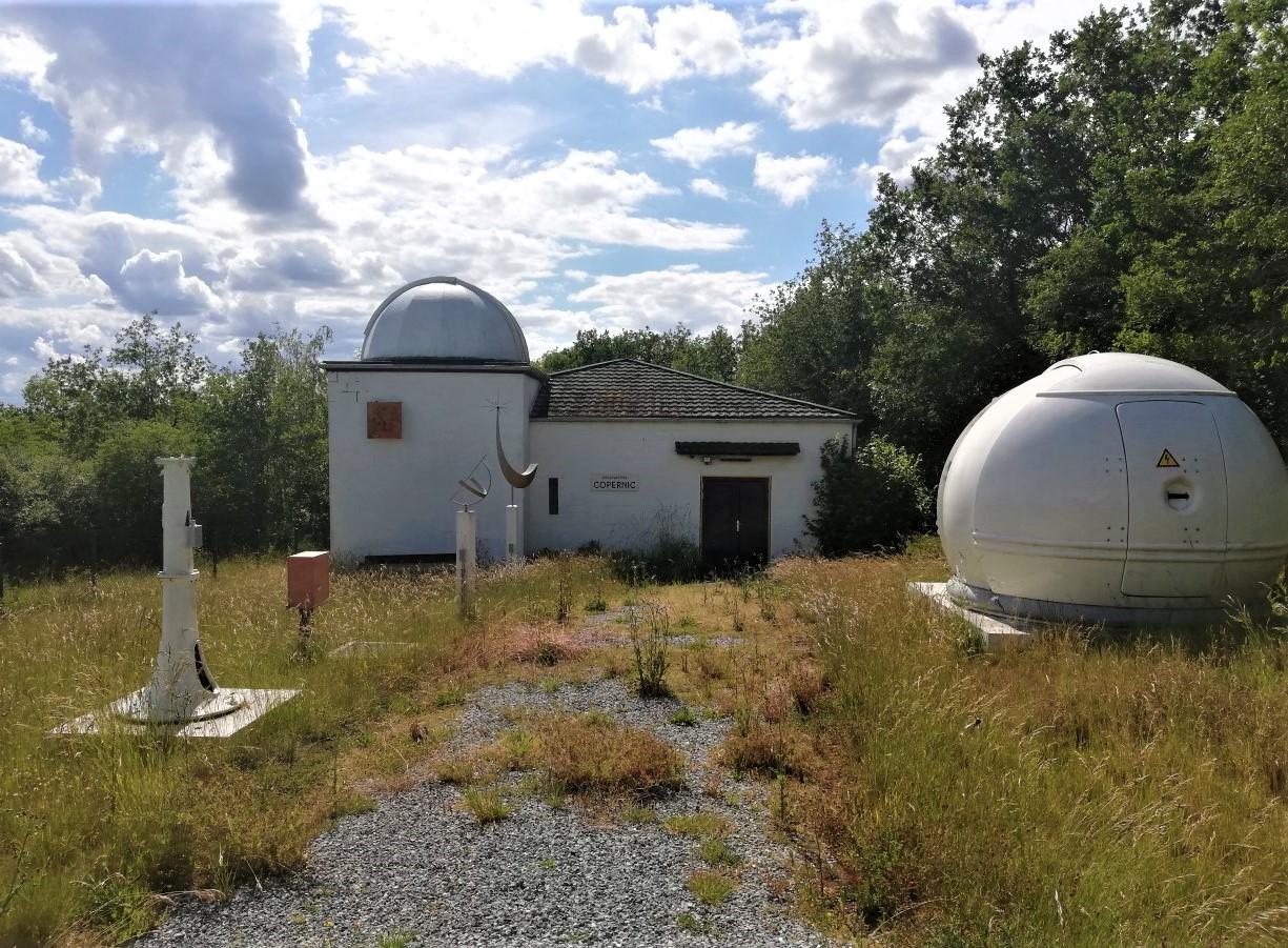 L'observatoire Copernic (Cercle Astronomique Mosan), Dinant, province de Namur en 2020.